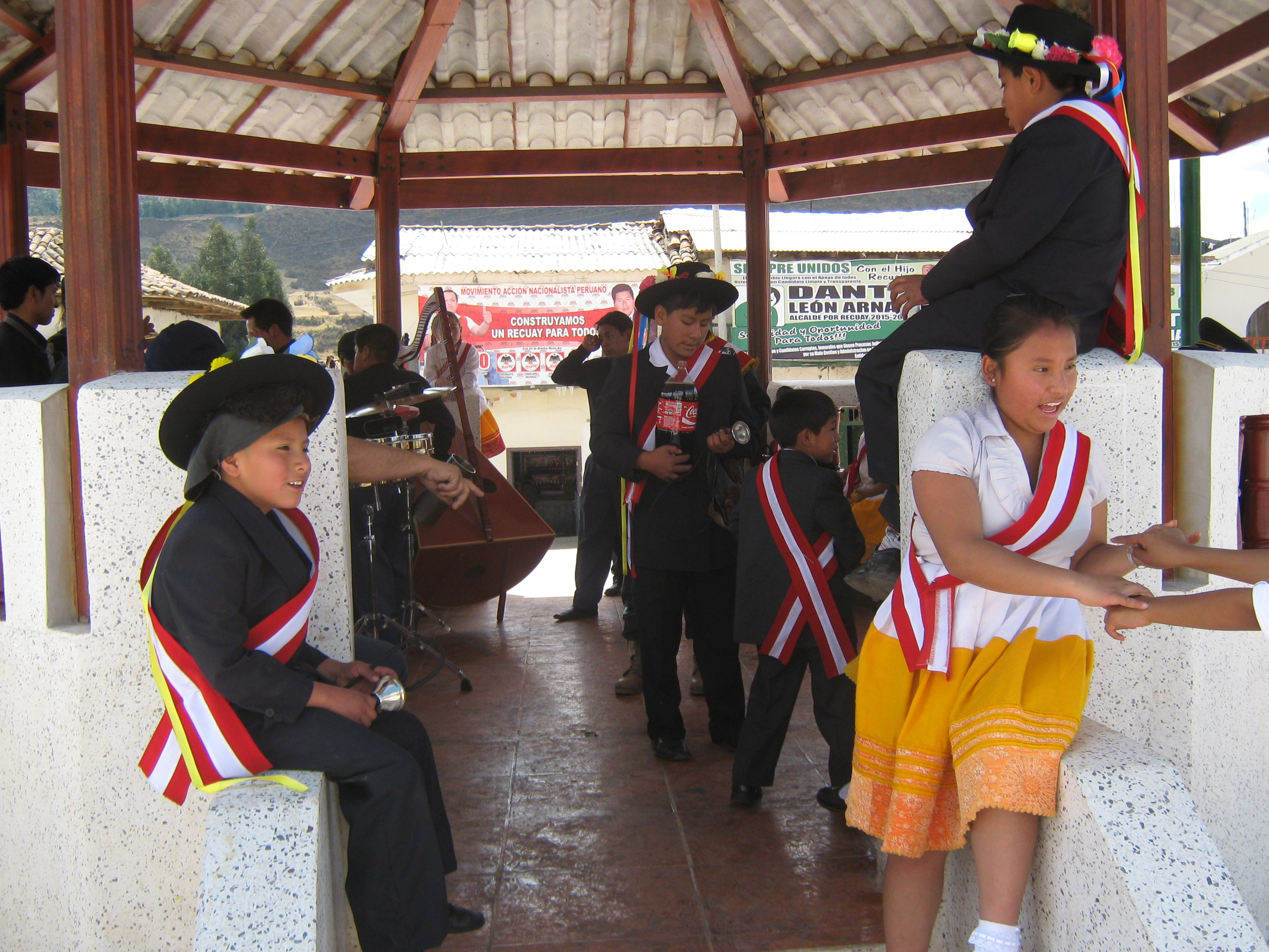 los negros de recuay en 2014